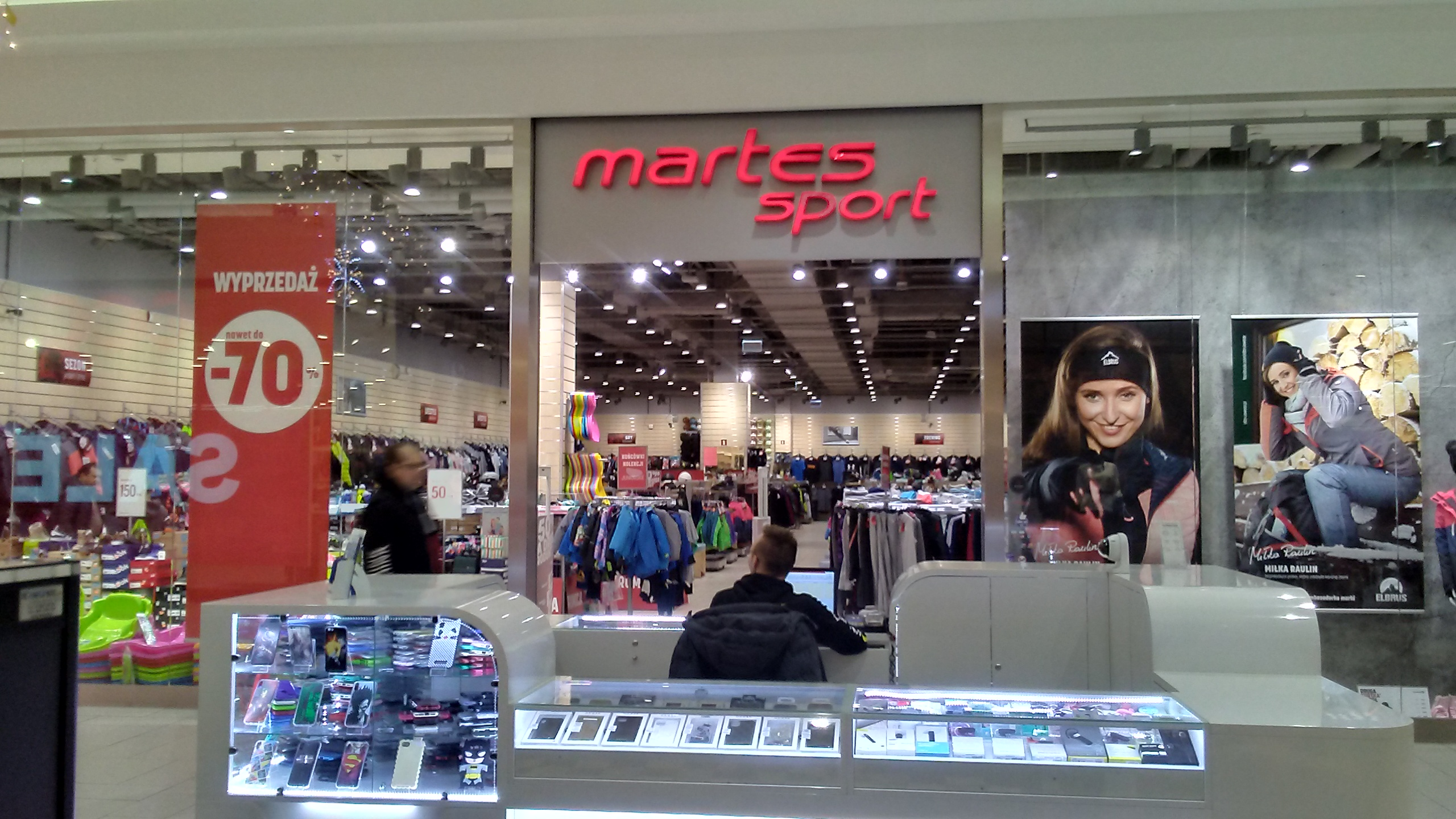 Tomaszów Mazowiecki w województwie łódzkim, PL, EU. Salon sportowy Martes w Galerii Tomaszow, CC0.